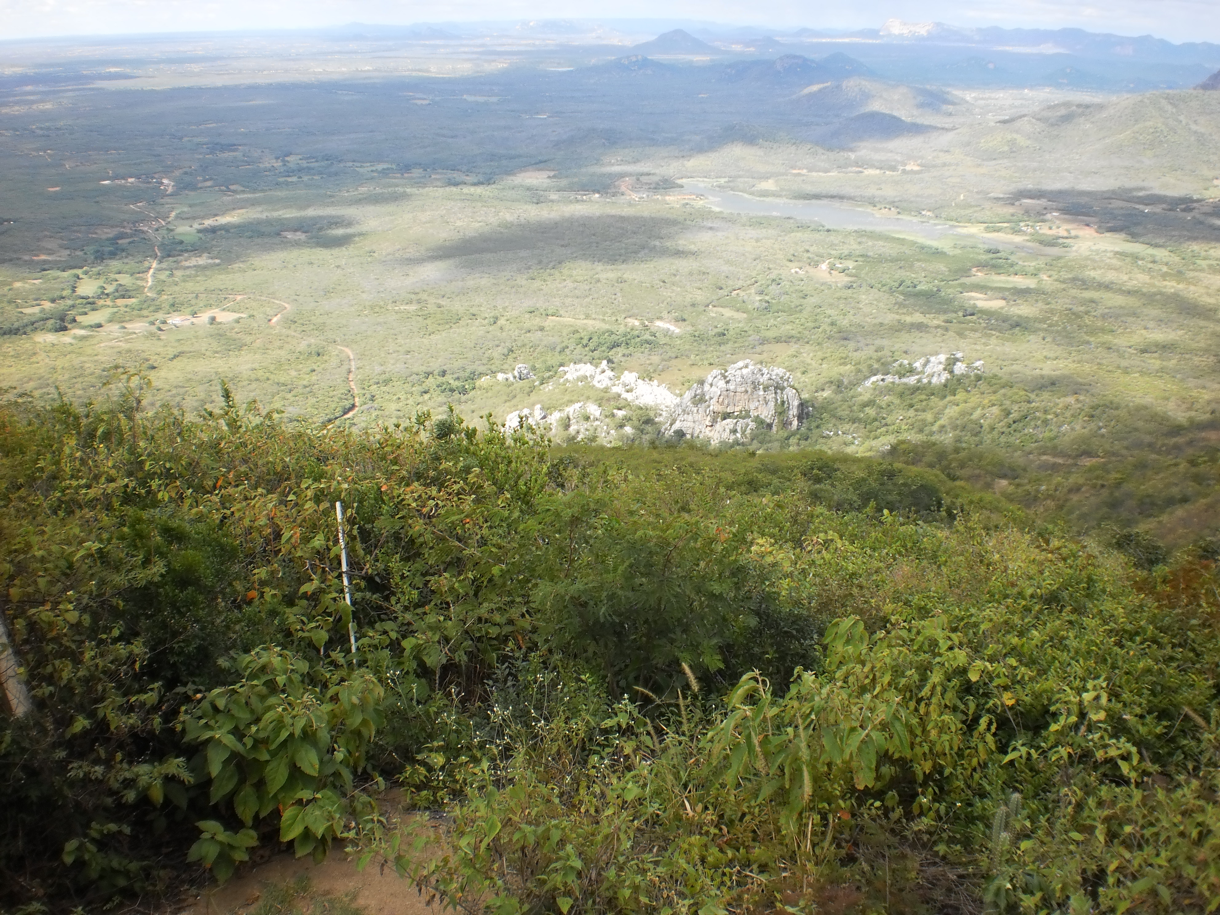 A Casa de Pedra (ao meio) vista do Mirante do Canto, no distrito de Salva Vida, em Martins, Rio Grande do Norte (Brasil).